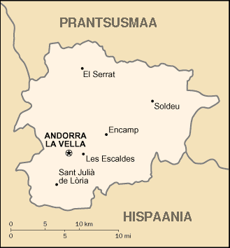 Andorra kaart